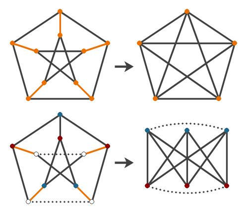 Subgrafs K5 i K3,3 del graf de Peterson